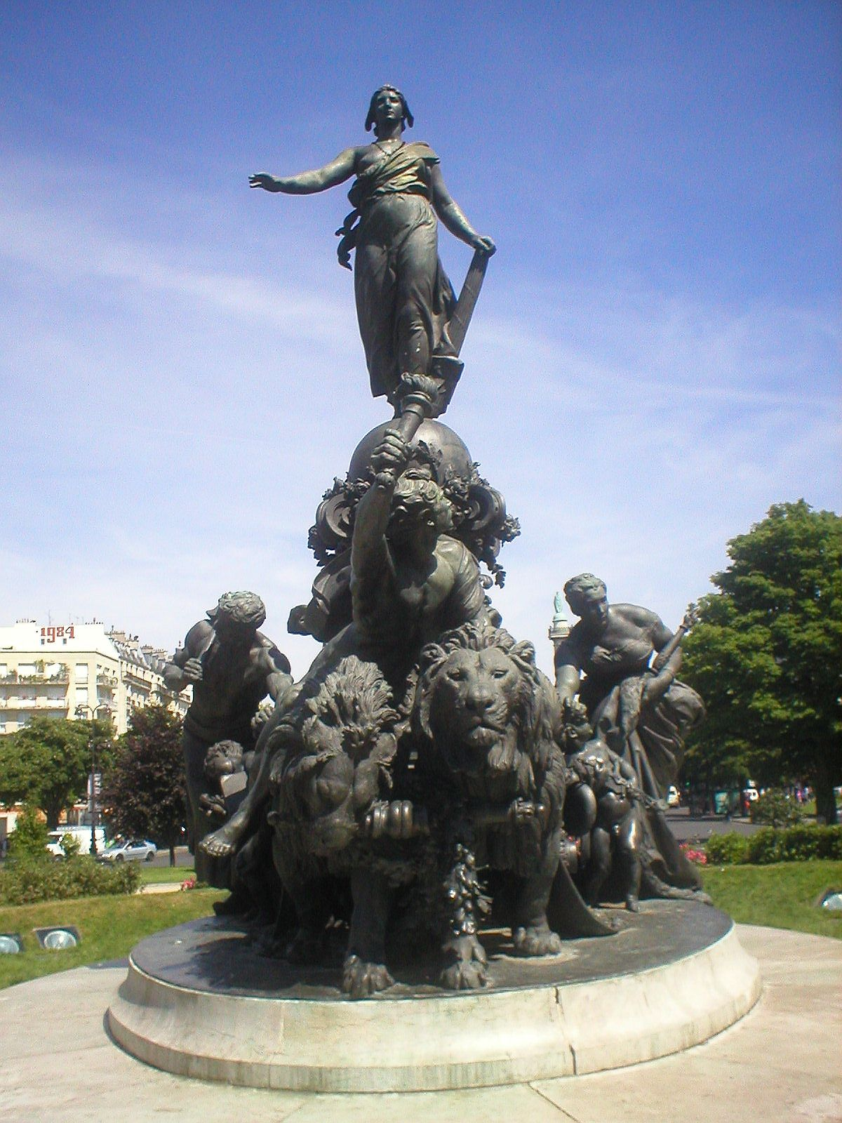 Le Triomphe de la République (1899) - Place de la Nation (Paris) Aimé-Jules Dalou Prise de vue personnelle (Juin 2006) Siren-Com 17:14, 9 June 2006 (UTC)